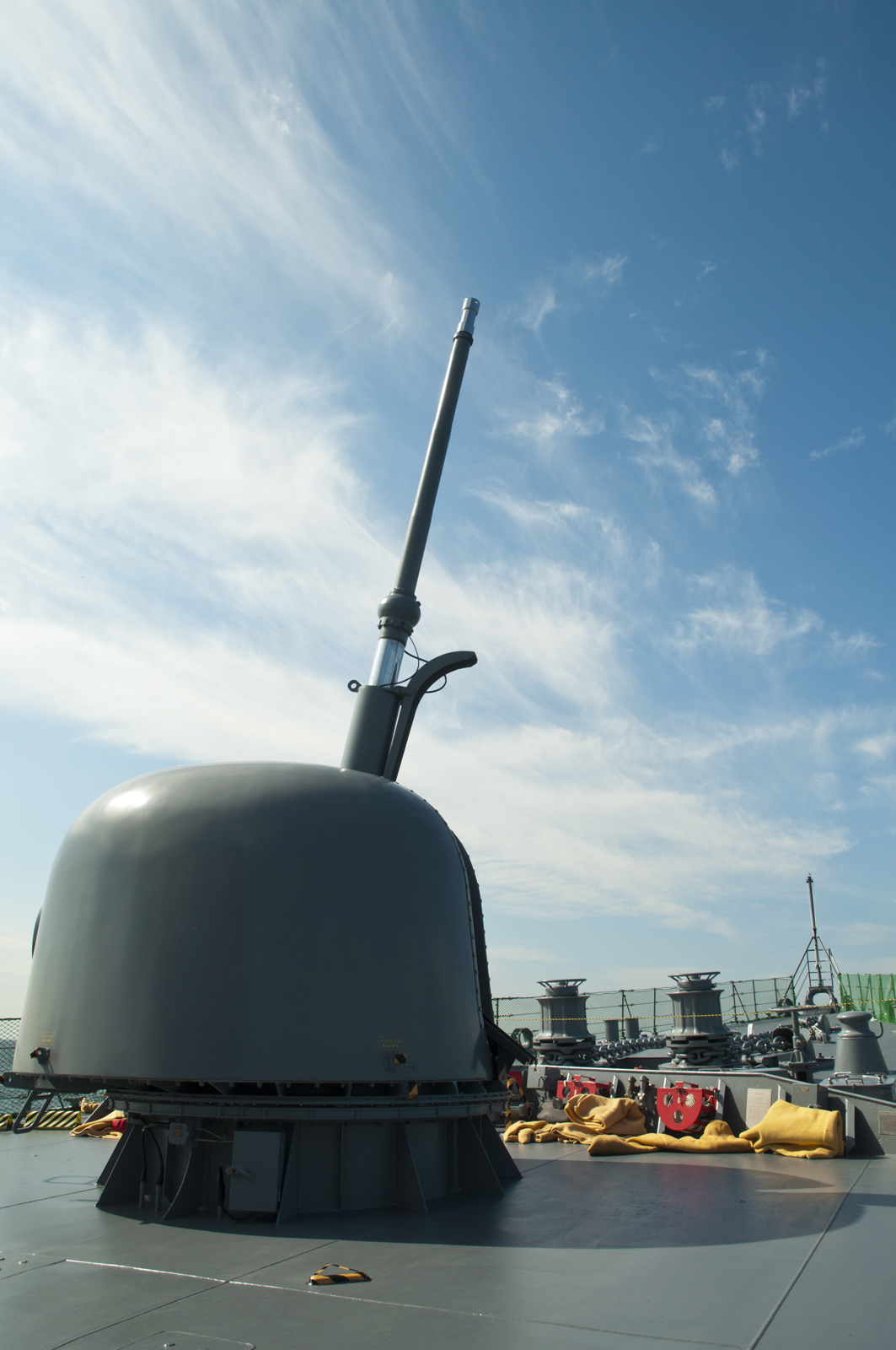 護衛艦せとぎり前甲板の62口径76ミリ速射砲。平成24年度観艦式予行1日目に撮影。